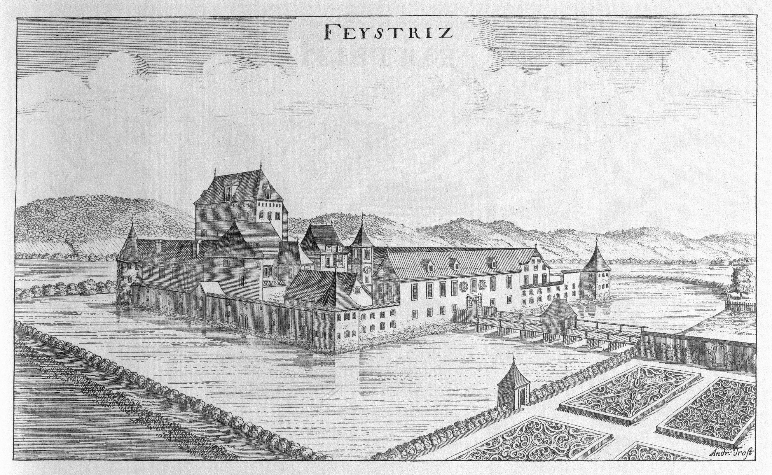 G. M. Vischers Käyserlichen Geographi, Topographia Ducatus Stiriae, Das ist: Eigentliche Delineation / und Abbildung aller Städte / Schlösser / Marcktfleck / Lustgärten / Probsteyen / Stiffter / Clöster und Kirchen / so es sich im Herzogthumb Steyrmarck befinden; Und anjetzo Umb einen billichen Preyß zu finden seynd Bey Johann Bitsch Universitäts Buchhandlern / Auff dem Juden=Platz bey der guldenen Saulen. Graz 1681 Die Nummerierung der Dateien folgt der alphabetischen Reihung der Orte